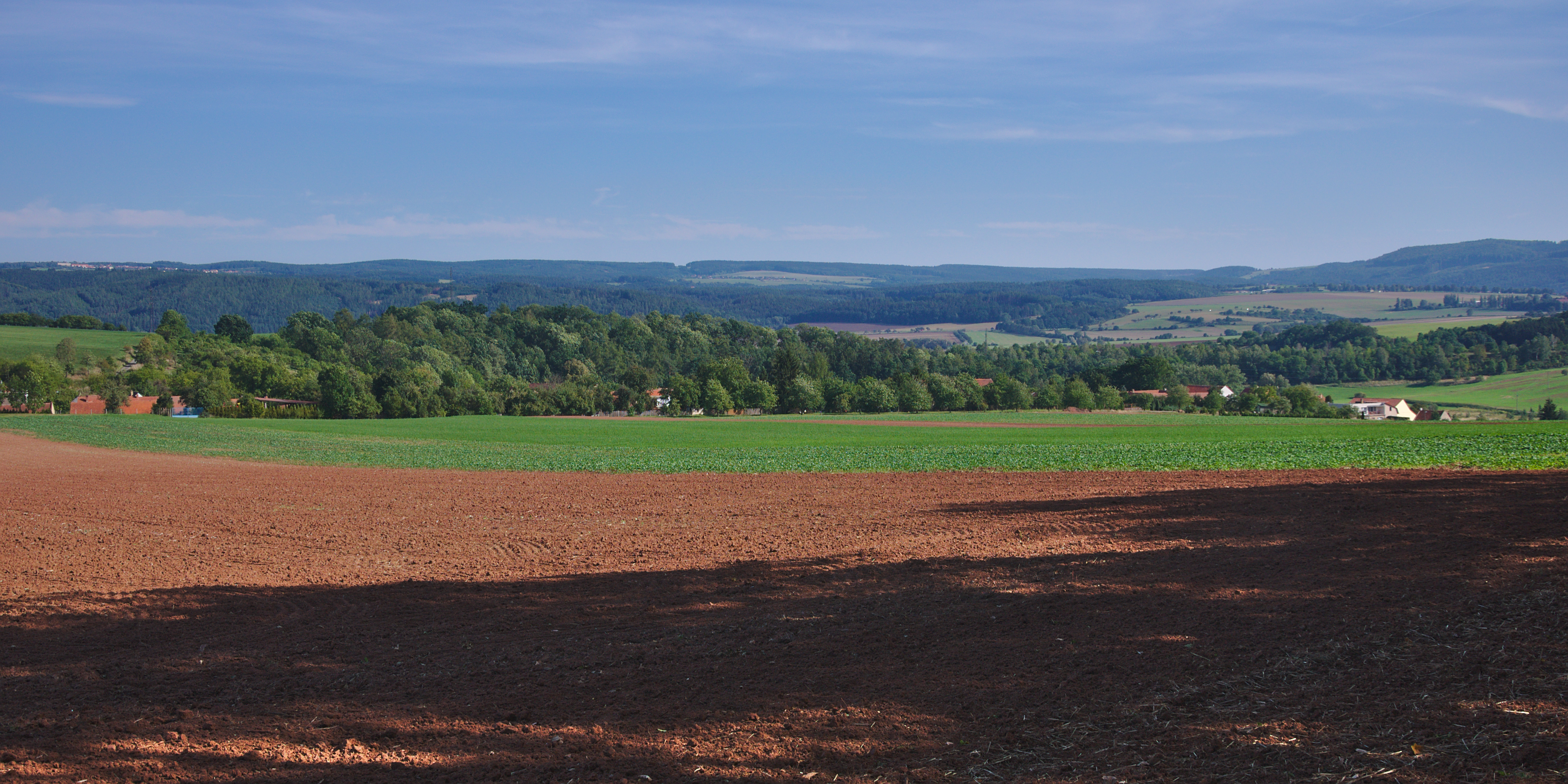 Pohled na obec od severozápadu, Bačov, Boskovice, okres Blansko